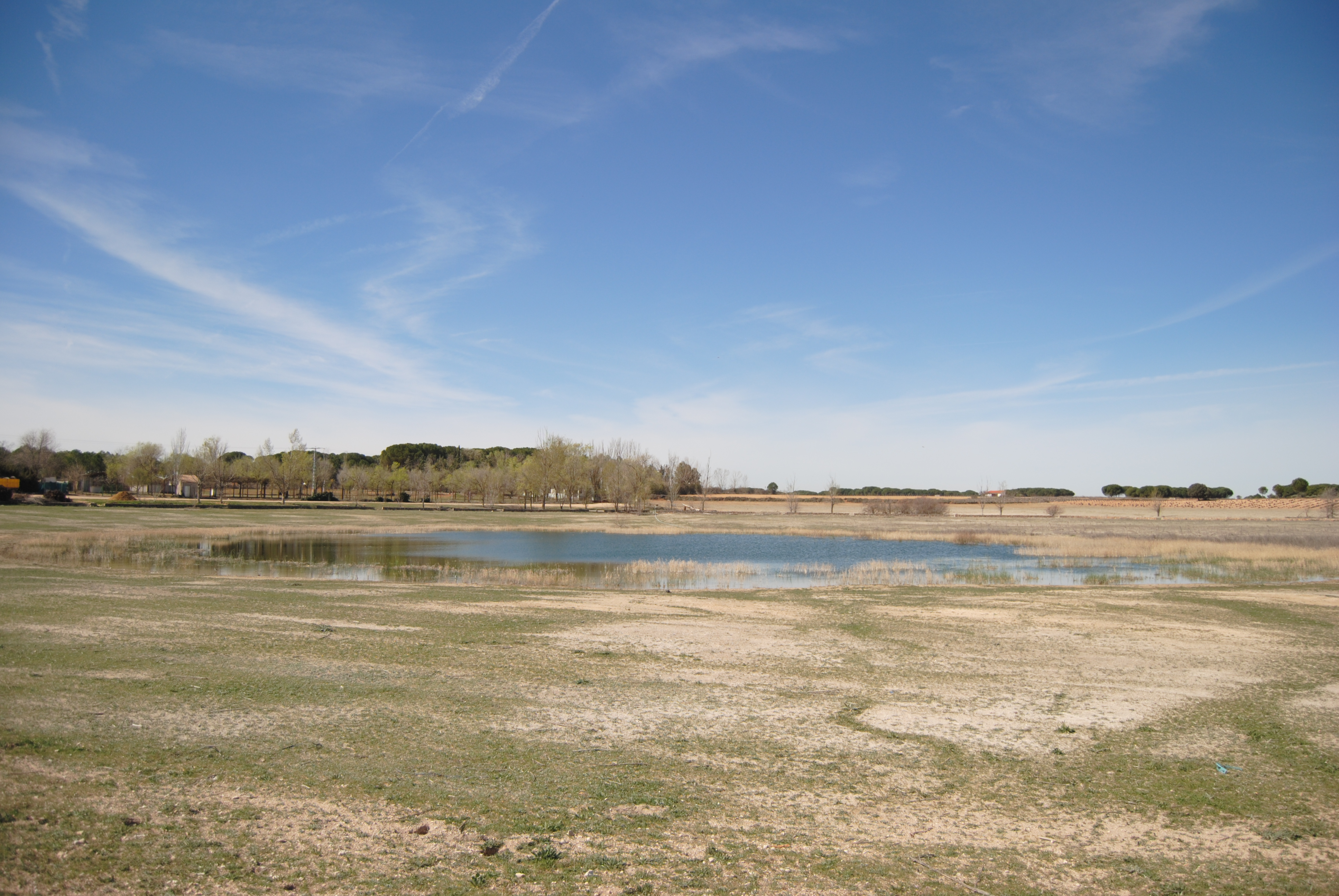 Paraje natural de El Pedernoso (Cuenca)